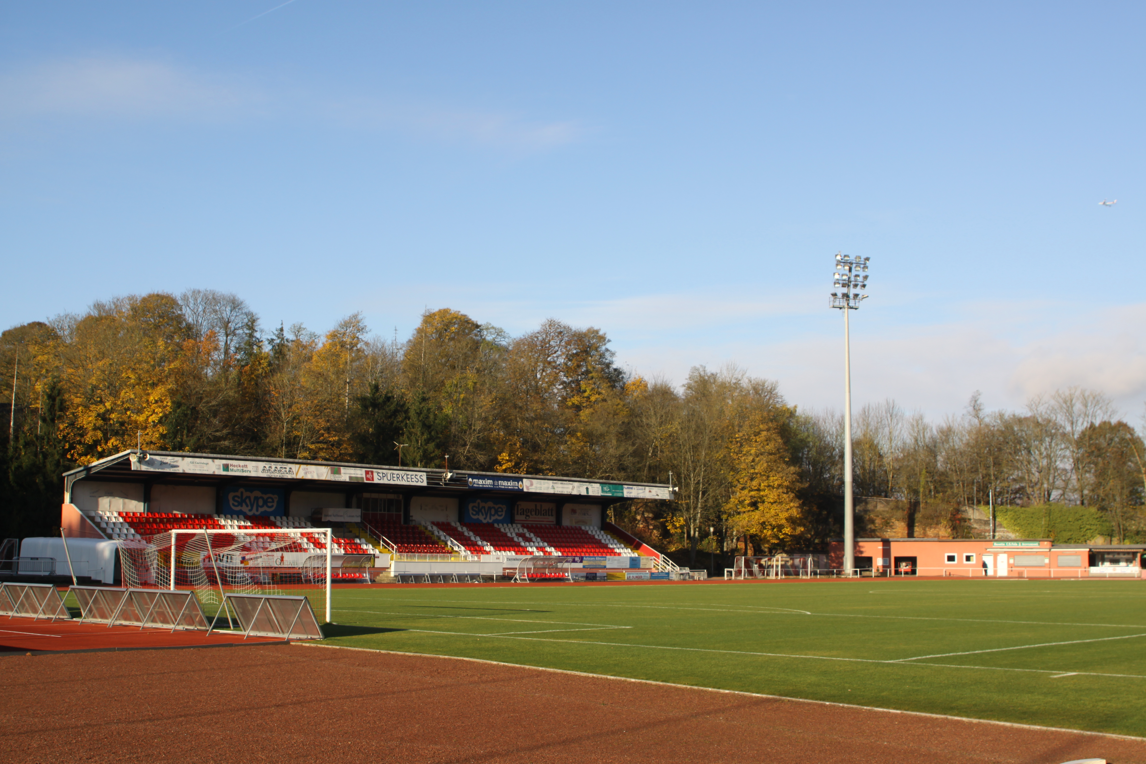 Stade Emile-Mayrisch ("Folas Terrain") zu Esch-Uelzecht: Vue op d'Tribünen